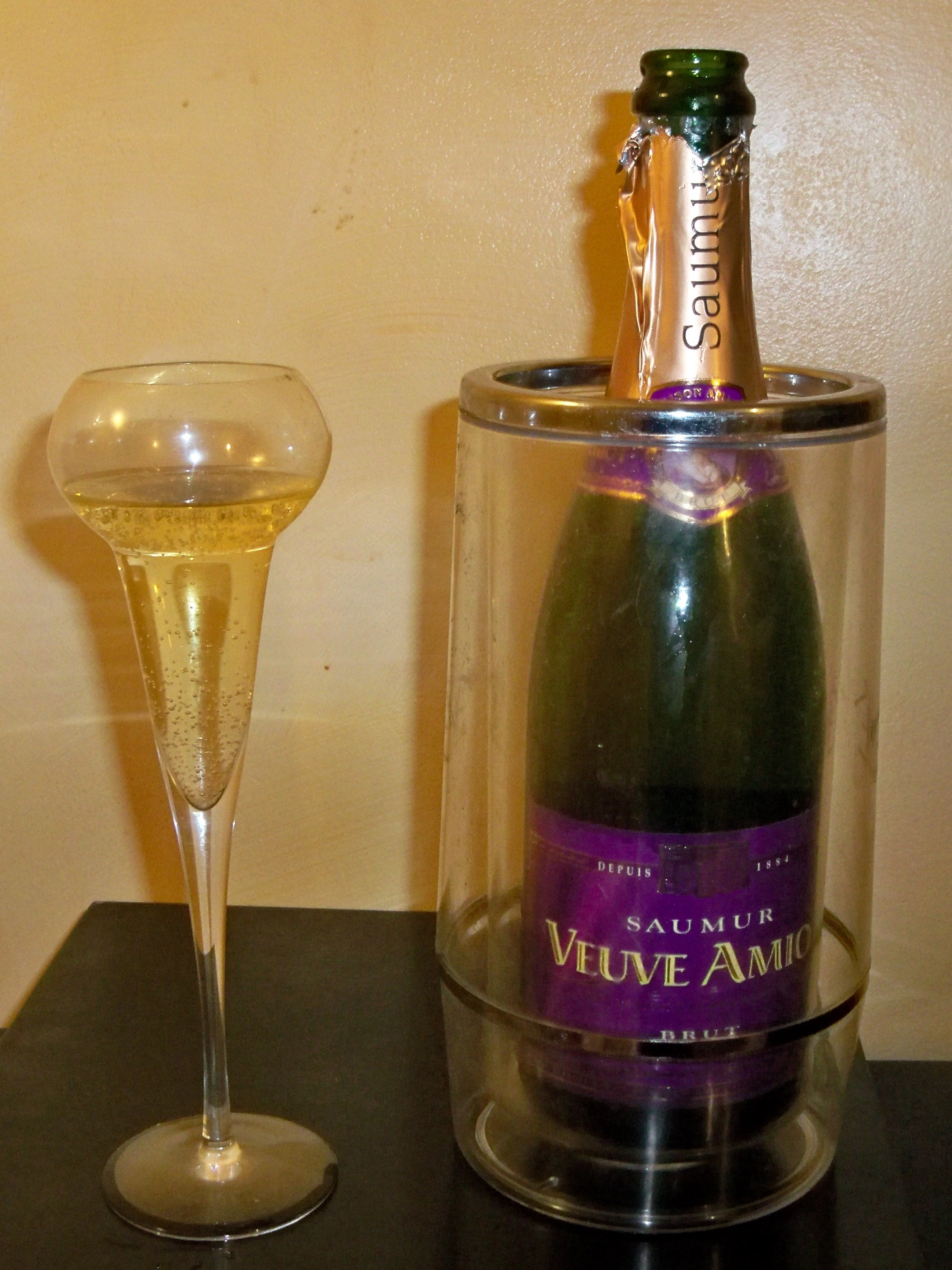 Bouteille de Saumur, avec flûte